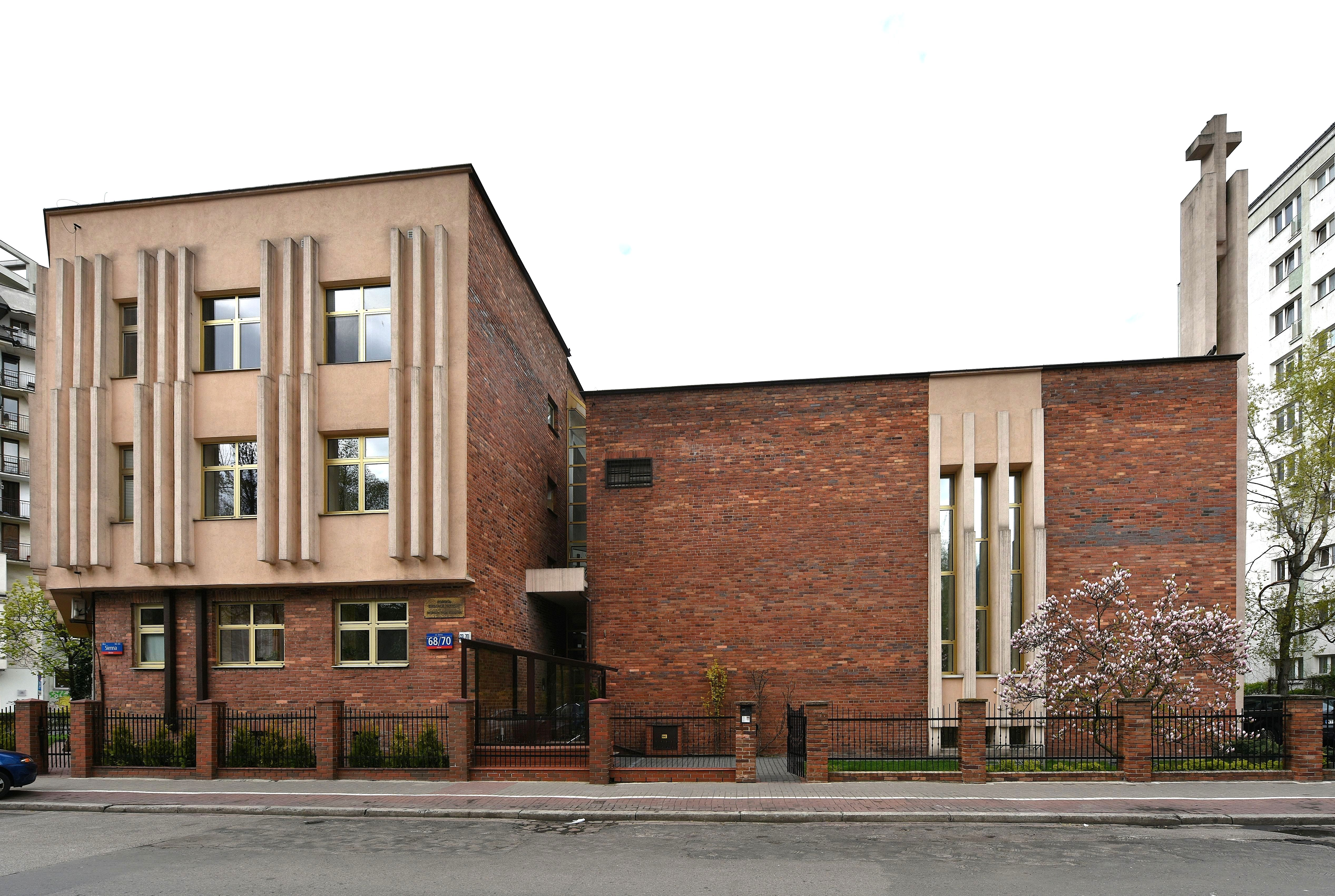 Zbór Stołeczny Kościoła Zielonoświątkowego przy ul. Siennej 68/70 w Warszawie